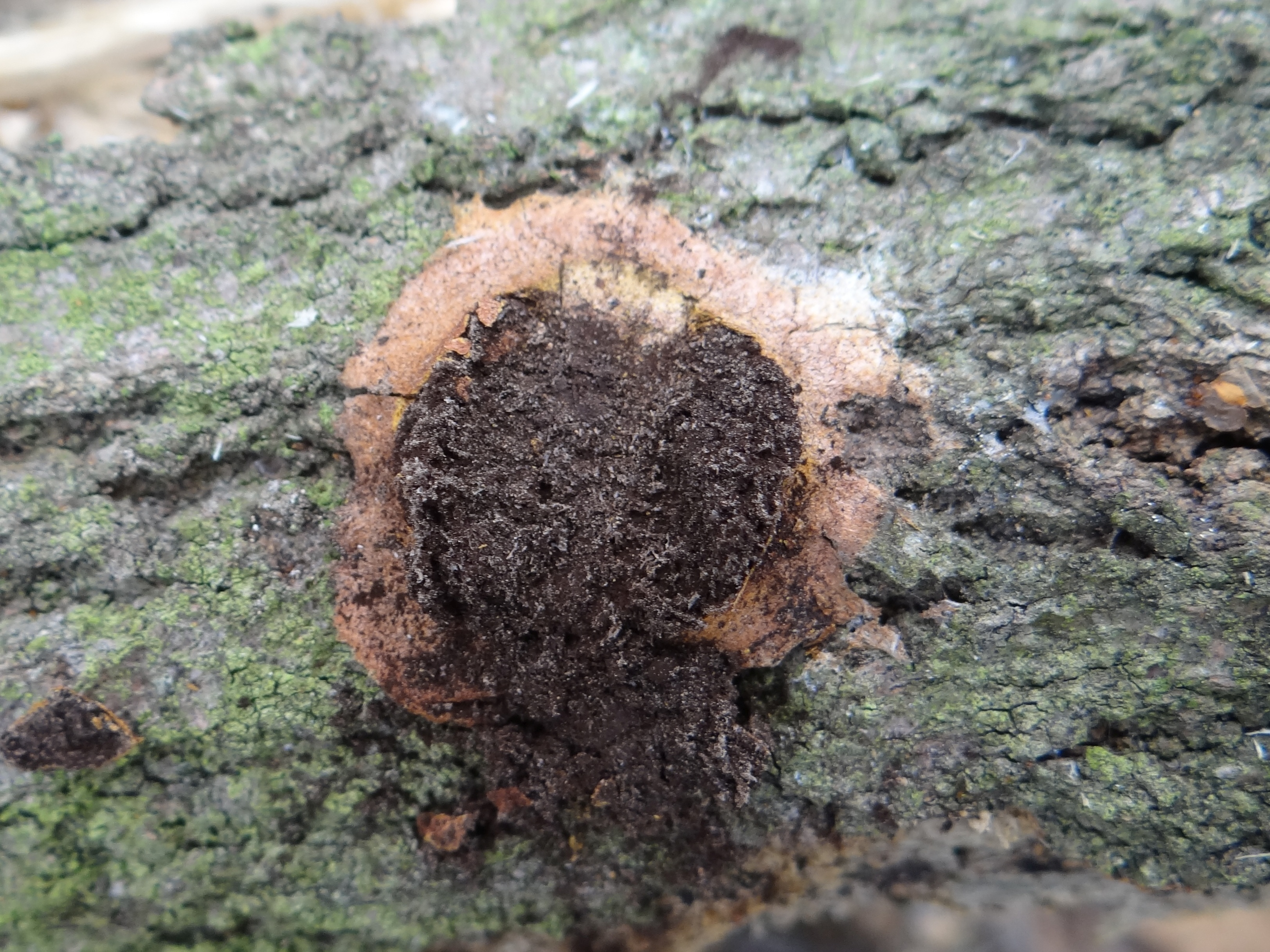 Fuligo leviderma (location: Poland, Beskid Makowski, Jałowiec)